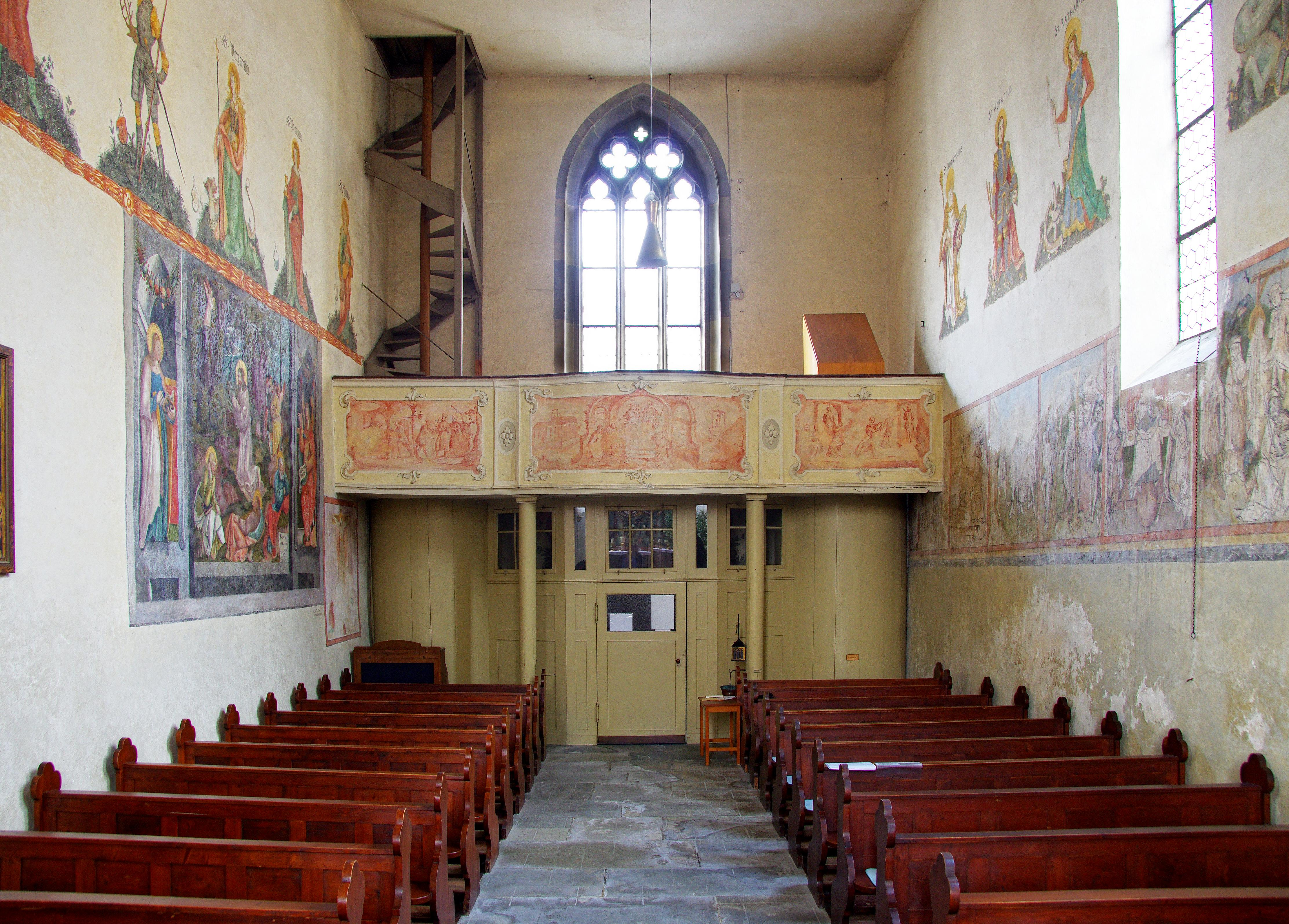 St. Jodok Überlingen, Blick vom Altar in das Kirchenschiff